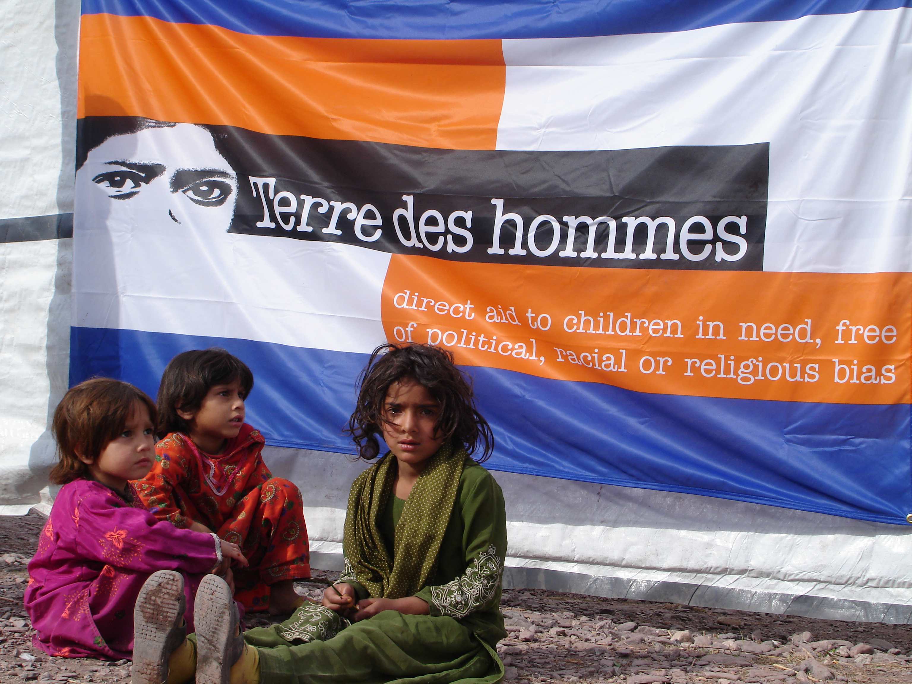 Pakistan